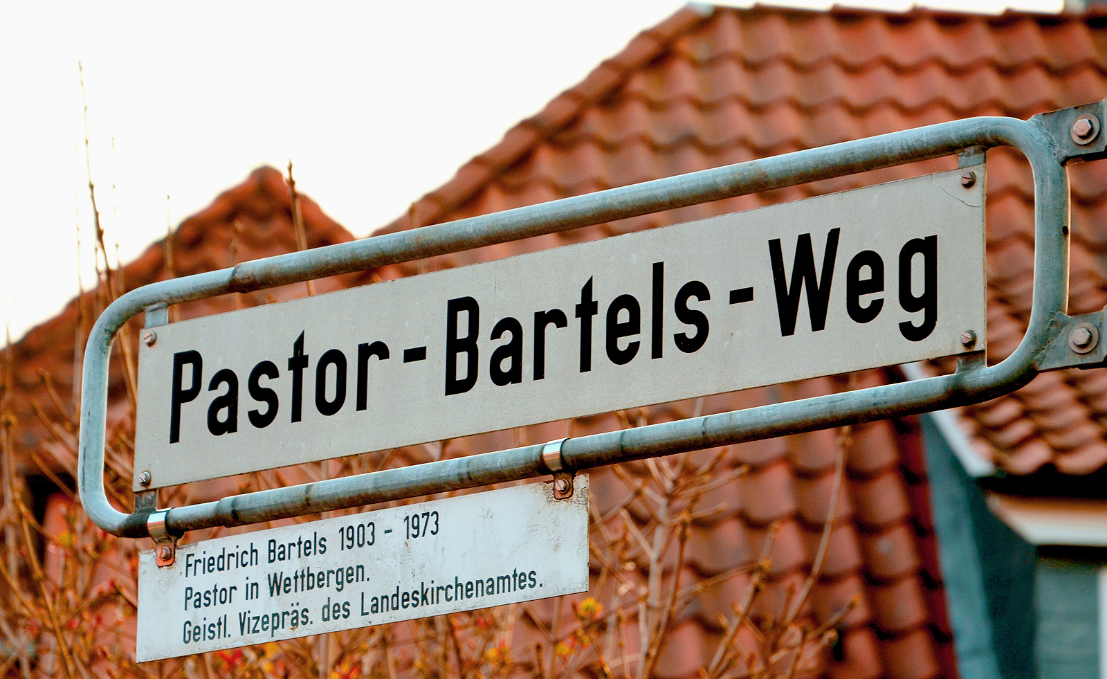 Straßenschild Pastor-Bartels-Weg in Hannover mit der Legendentafel „Friedrich Bartels 1903 - 1973, Pastor in Wettbergen. Geistl[icher] Vizepräsident des Landeskirchenamtes.“ nahe der Johannes-der-Täufer-Kirche ...